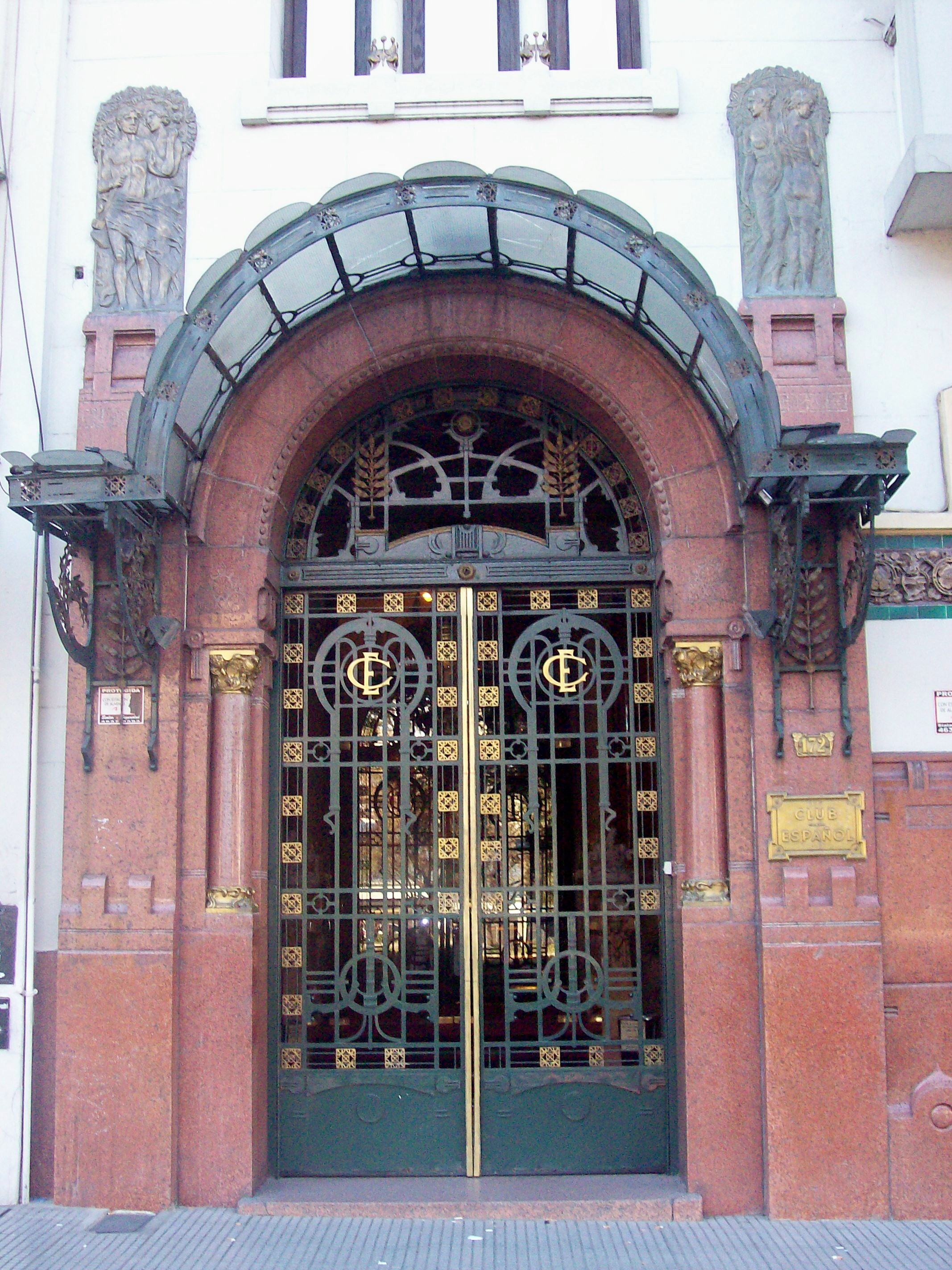 Entrada al edificio del Club Español, en Bernardo de Irigoyen 176, Buenos Aires, Argentina.